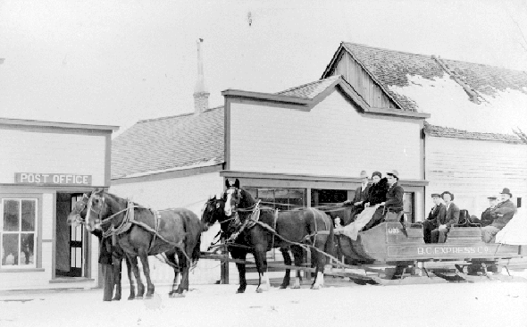 BC Express sled at Quesnel